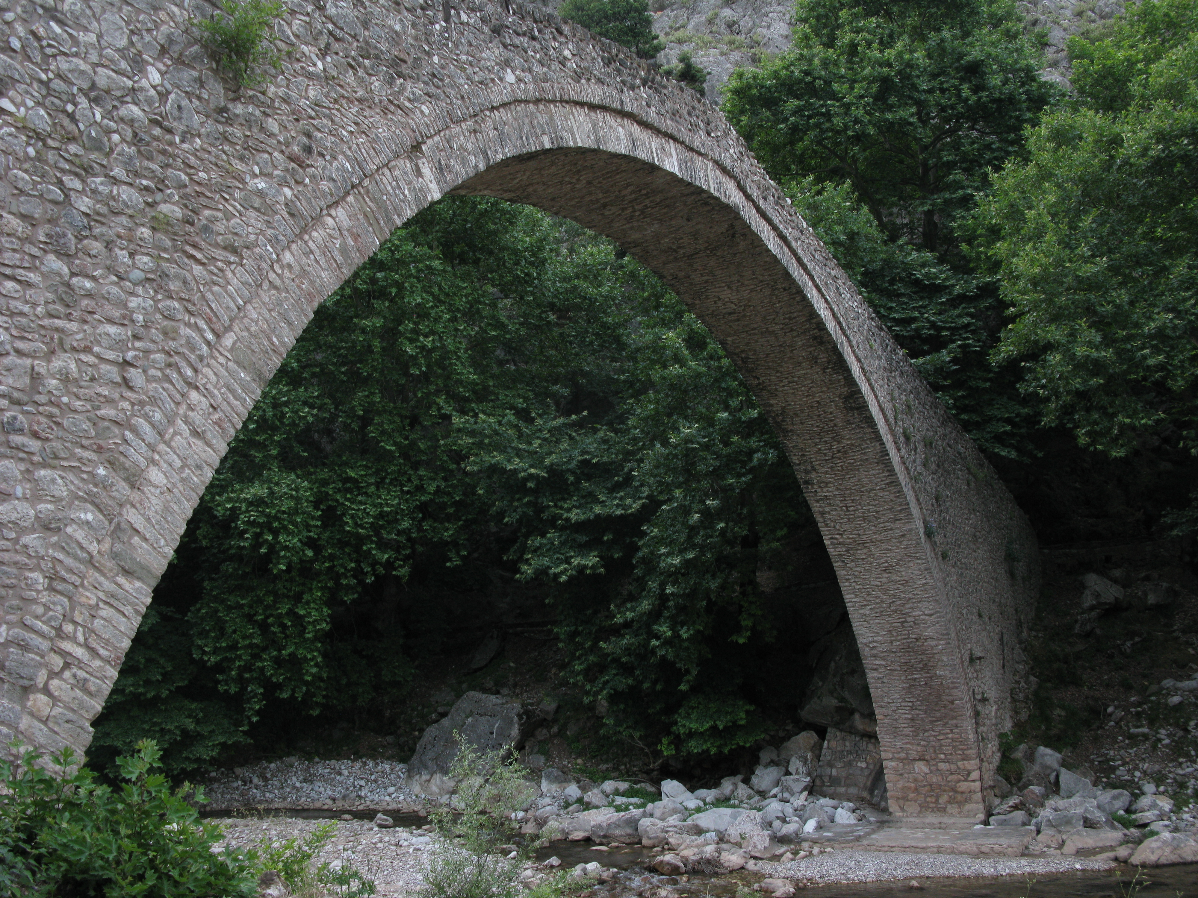 Τοξωτή λίθινη γέφυρα του Πορταϊκού (1514 μ.Χ.). Βρίσκεται περίπου 1 χλμ έξω από το χωριό Πύλη, Τρικάλων. Έργο του Αγίου Βησσαρίωνος.